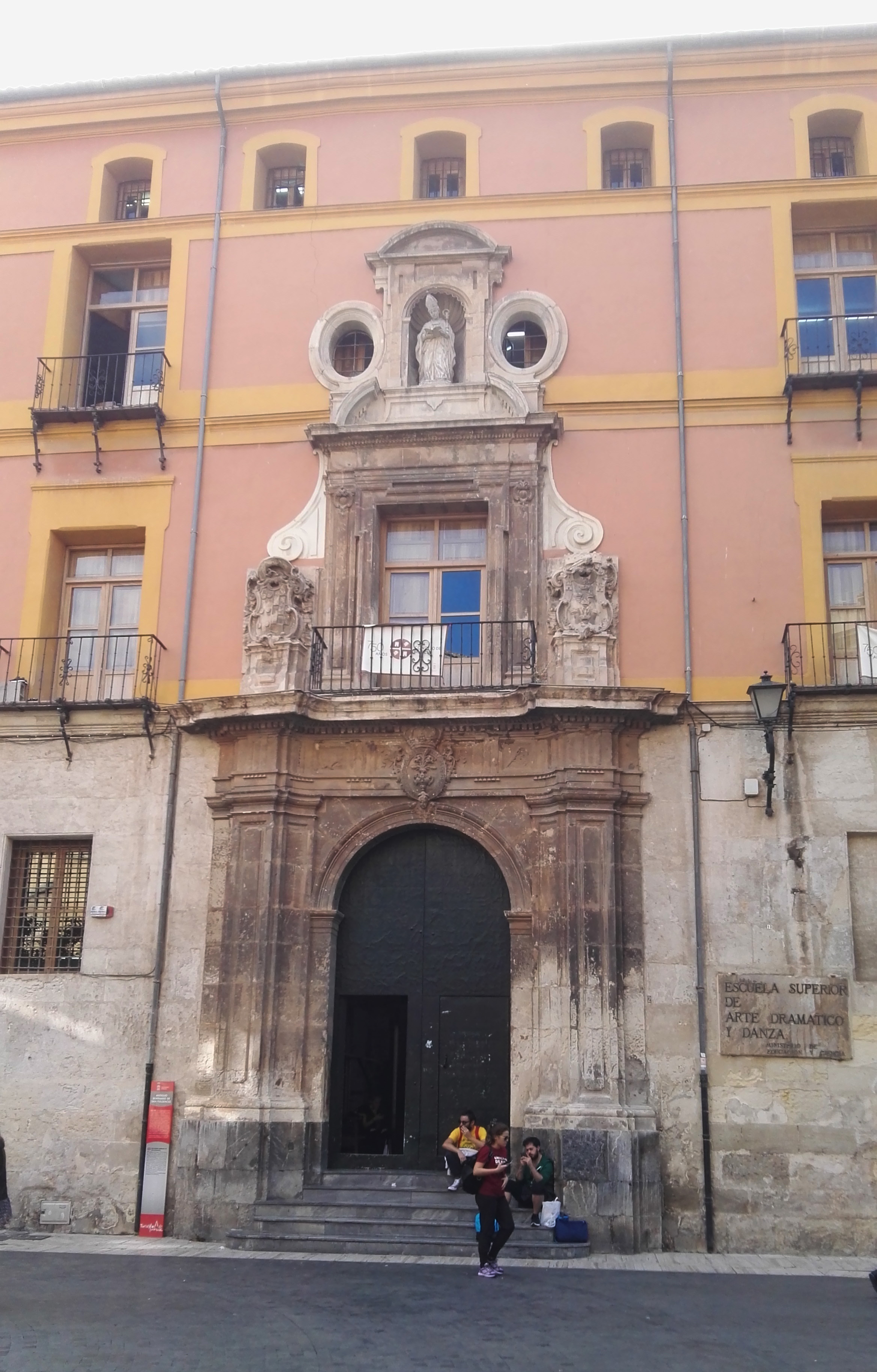 Se encuentra justo enfrente de la catedral